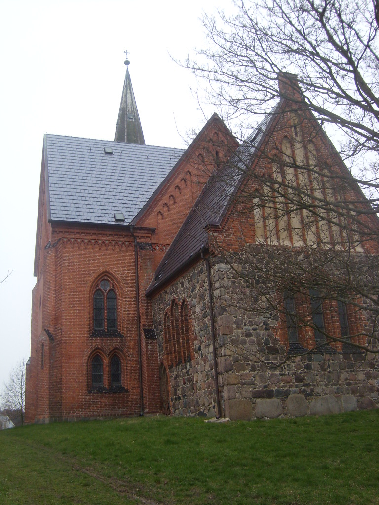 gotischer Chor der Dorfkirche Carlow in Granitquader-Bauweise hinter dem neugotischen Querschiff aus dem 19. Jh. in Backstein